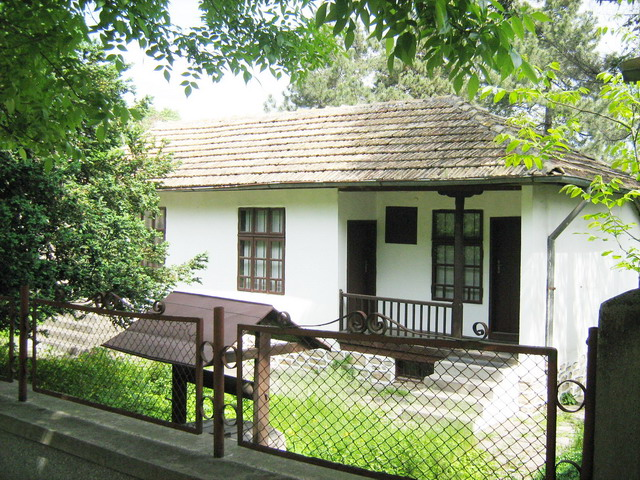 Къщата с етнографската експозиция към Исторически музей-Попово. Бившата къща-музей на Мара Тасева - май 2008 год. Фото: Вл. Стойков